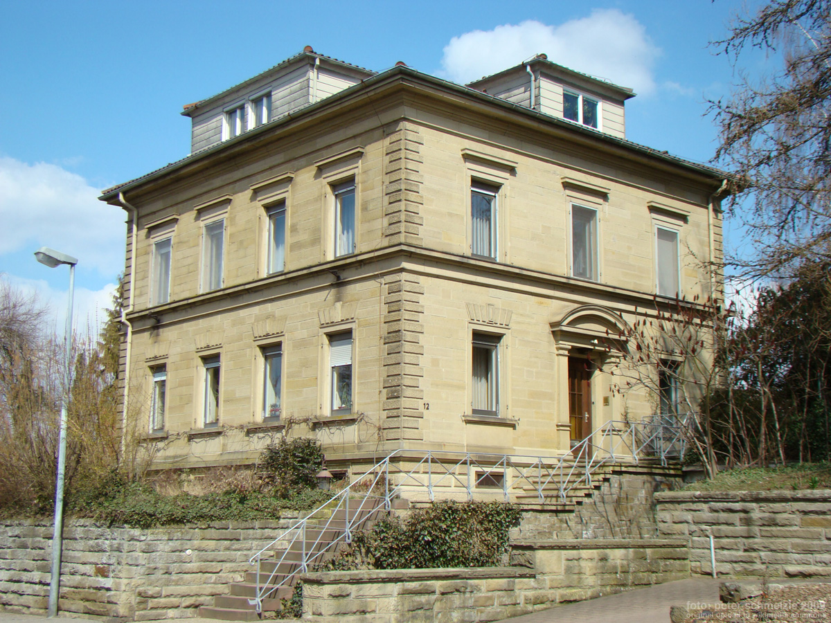 Historisches Gebäude Kaiserstr. 12 in Eppingen